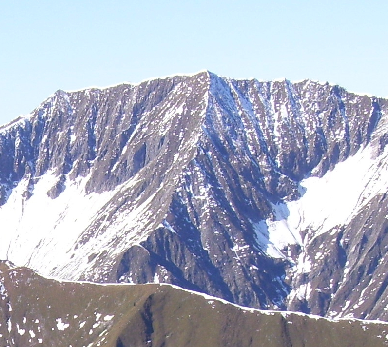 Mittlere Kreuzspitze aus Osten